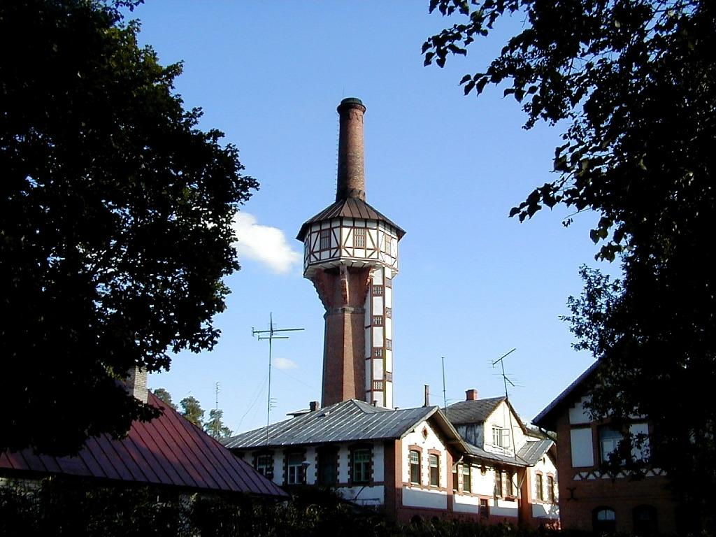 Strenči, slimnīcas dūmenis ar ūdenstvertni 2000-08-05